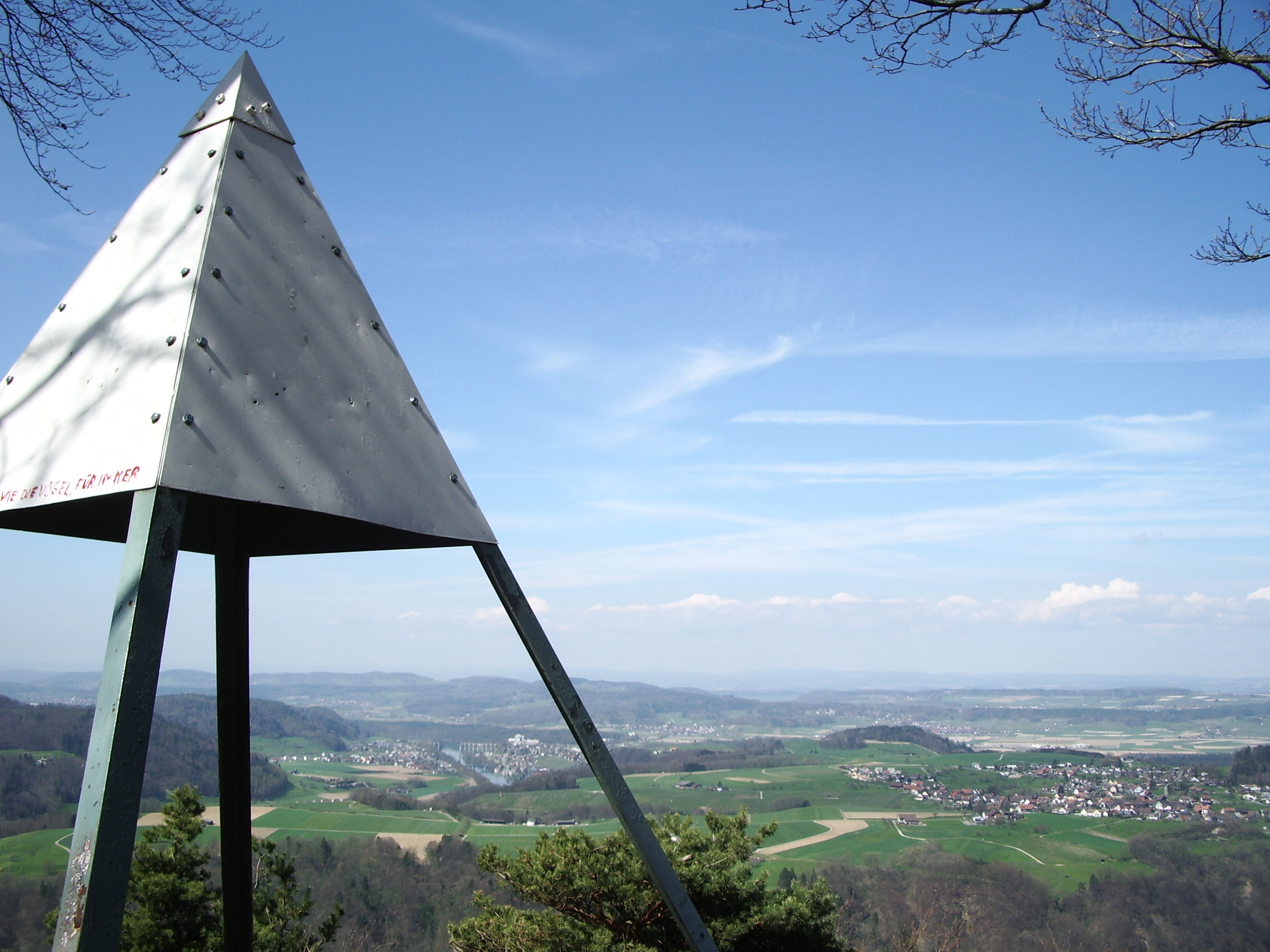 Blick von der Hochwacht Richtung Eglisau. Bild selbst erstellt am 6.4.2007 H. Müller